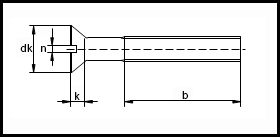 ISO 2009